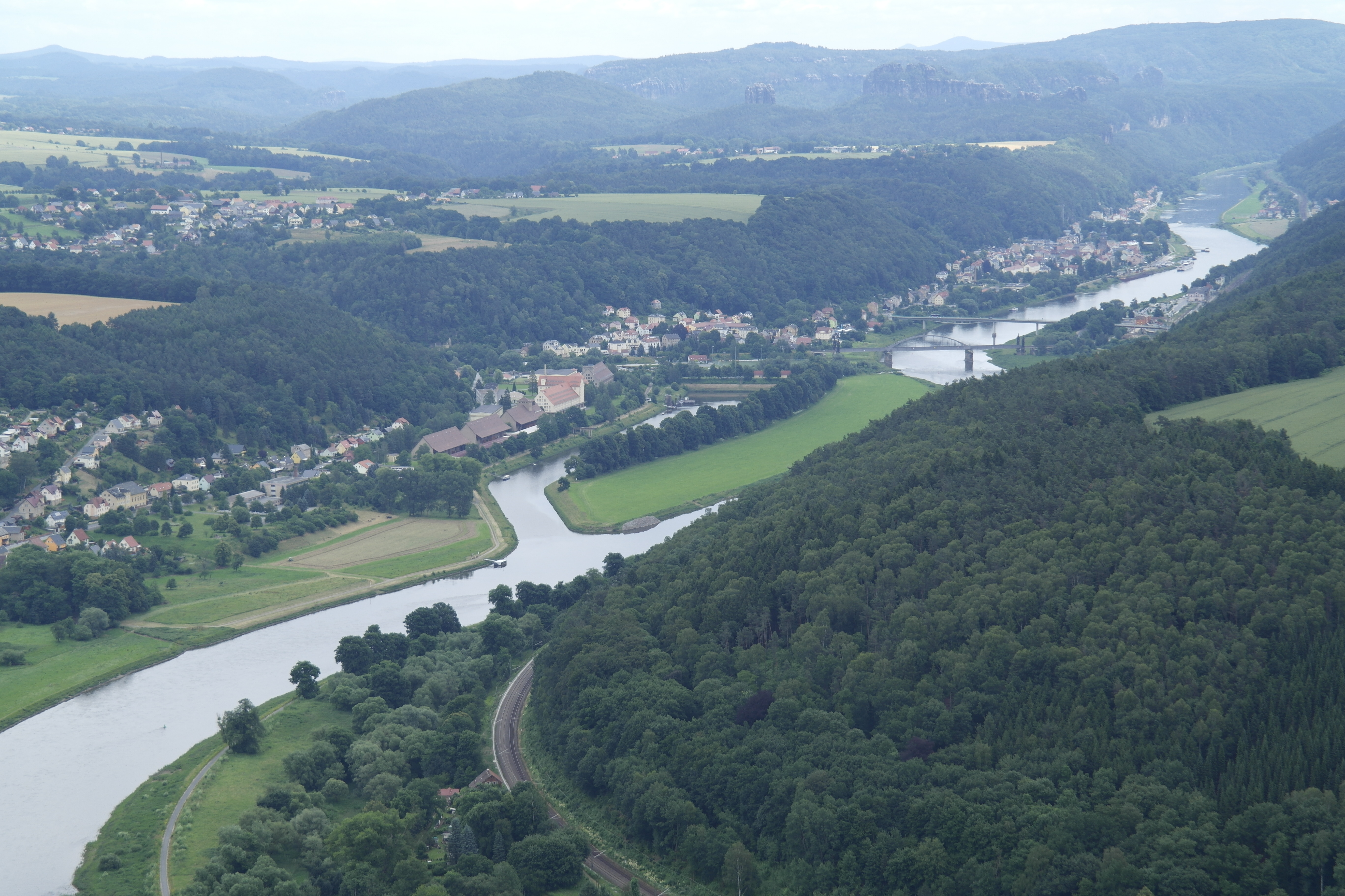 Lilienstein Juni 2016: Bilck von der Aussichtsplattform